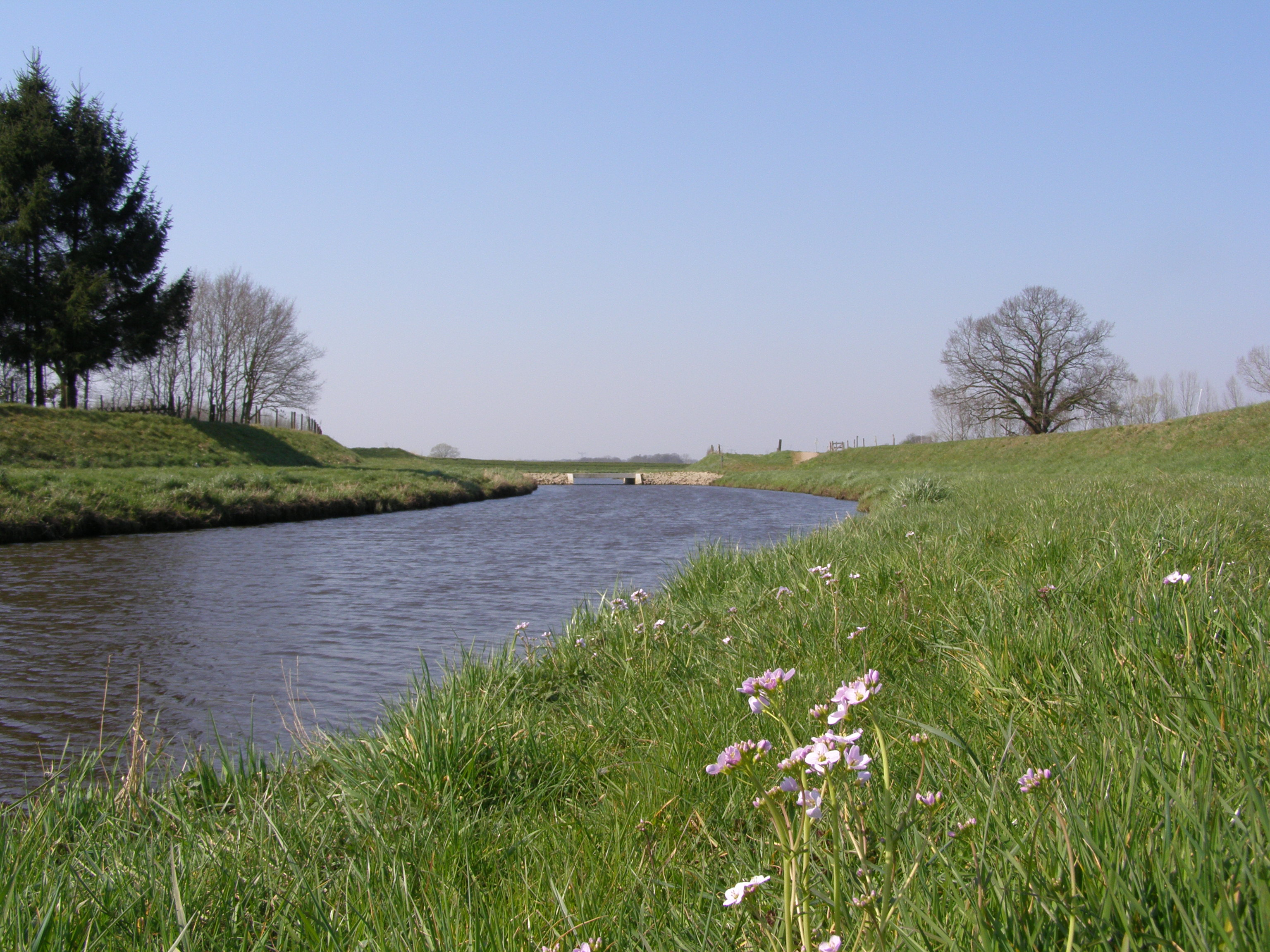 eigen werk